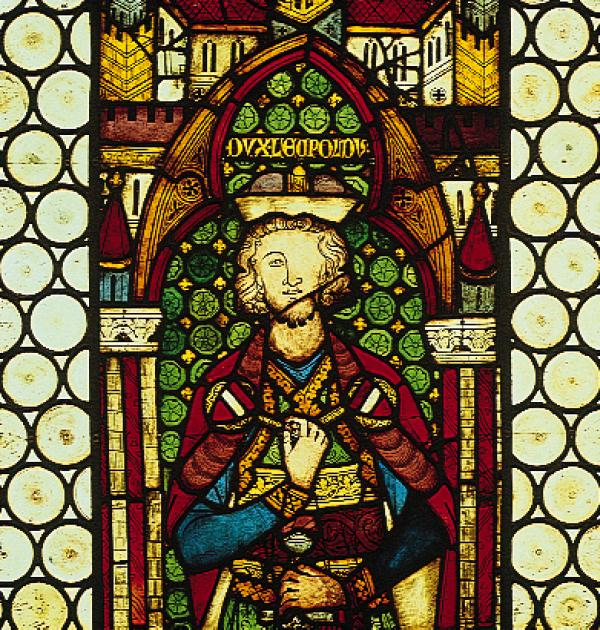 Leopold VI. Babenberský